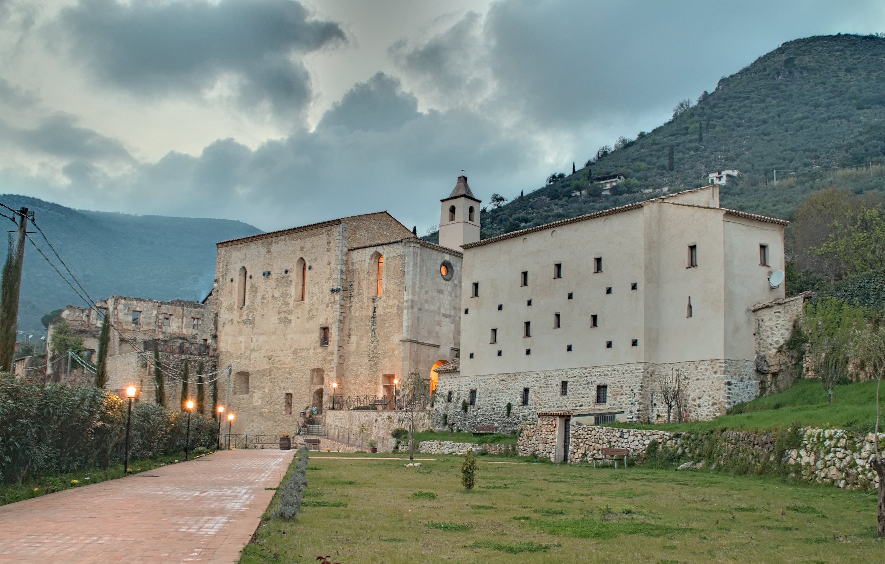 Abbazia San Magno Fondi (LT)